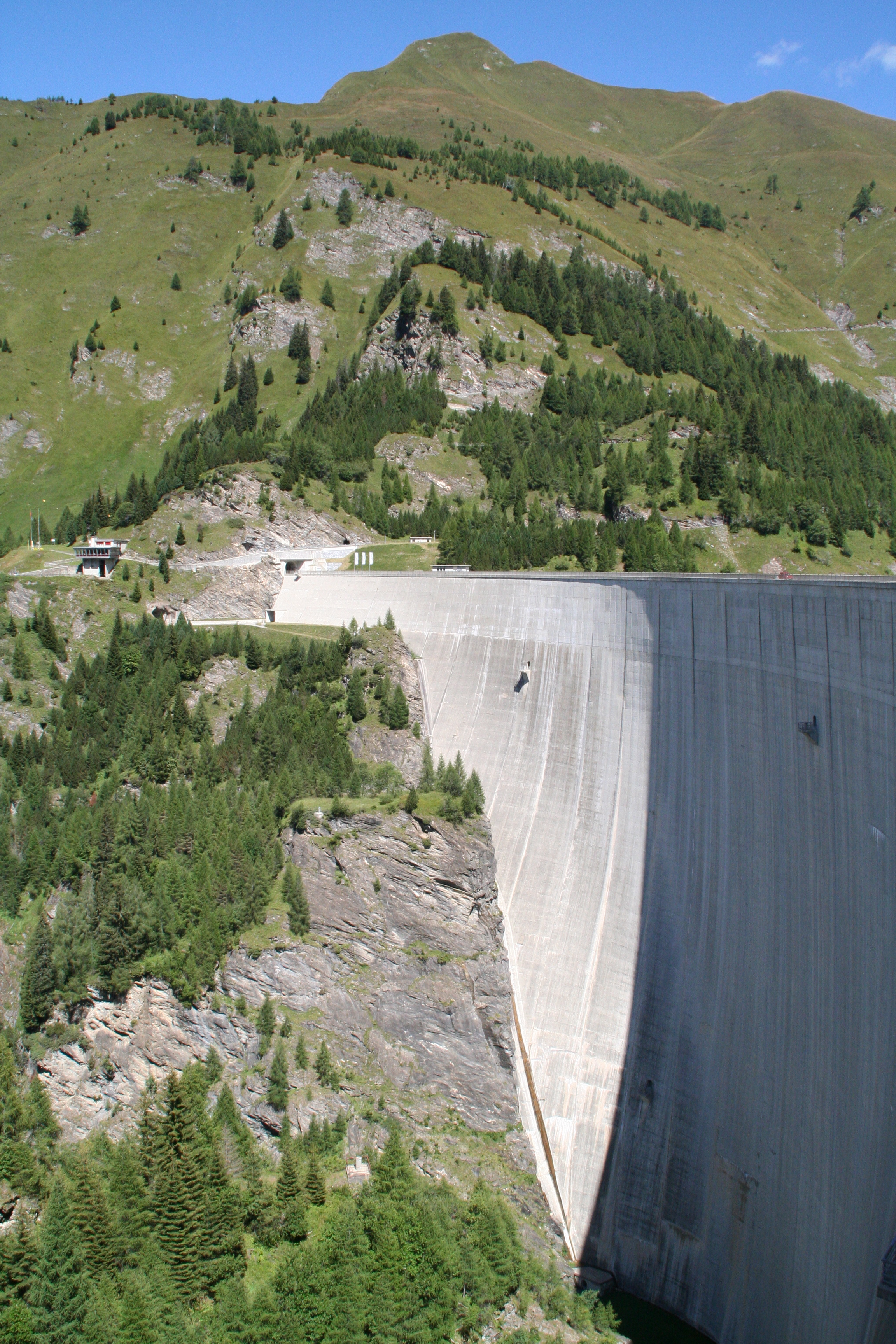 Lago di Luzzone nach Westen mit Restaurant